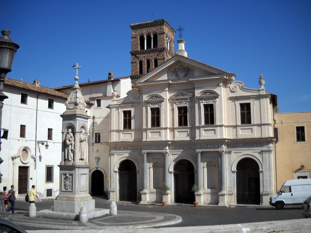 Chiesa_San_Bartolomeo_all'Isola_Tiberina,_Roma